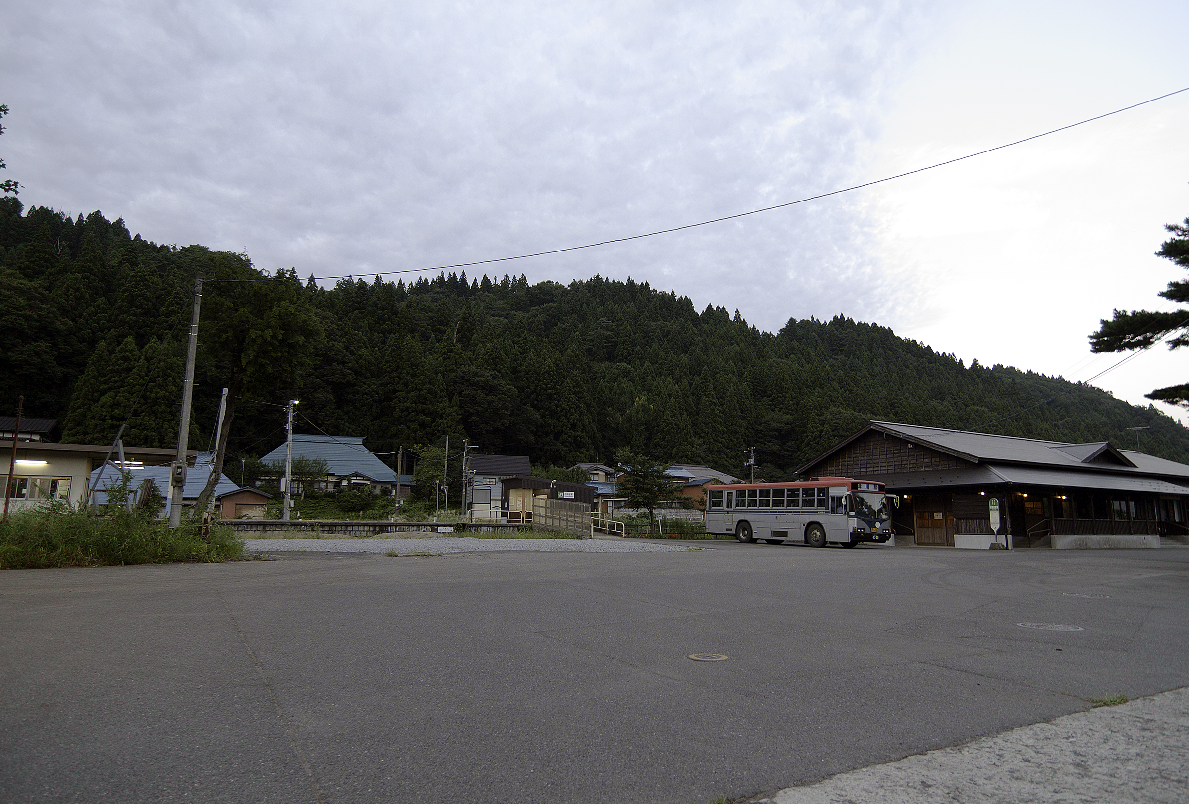 東日本旅客鉄道株式会社磐越西線日出谷駅新駅舎全景